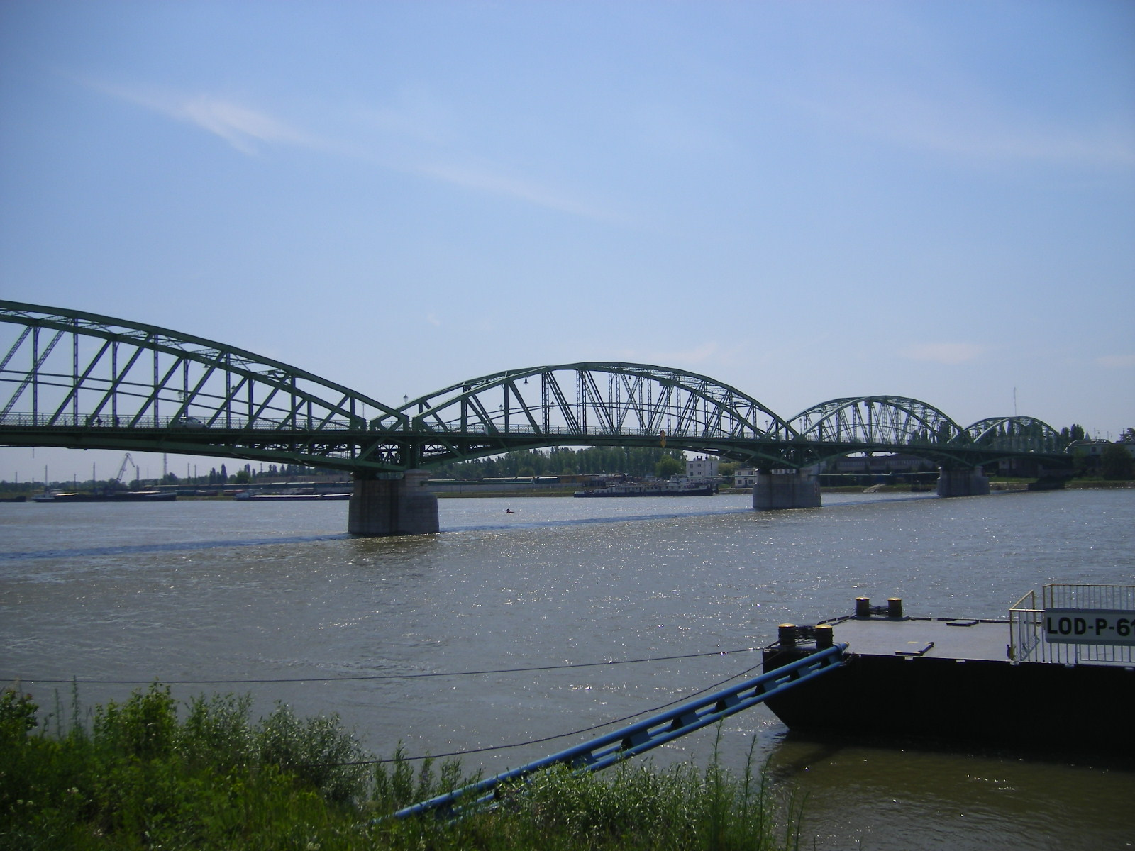 Komárom - az Erzsébet-híd az északi oldalról.